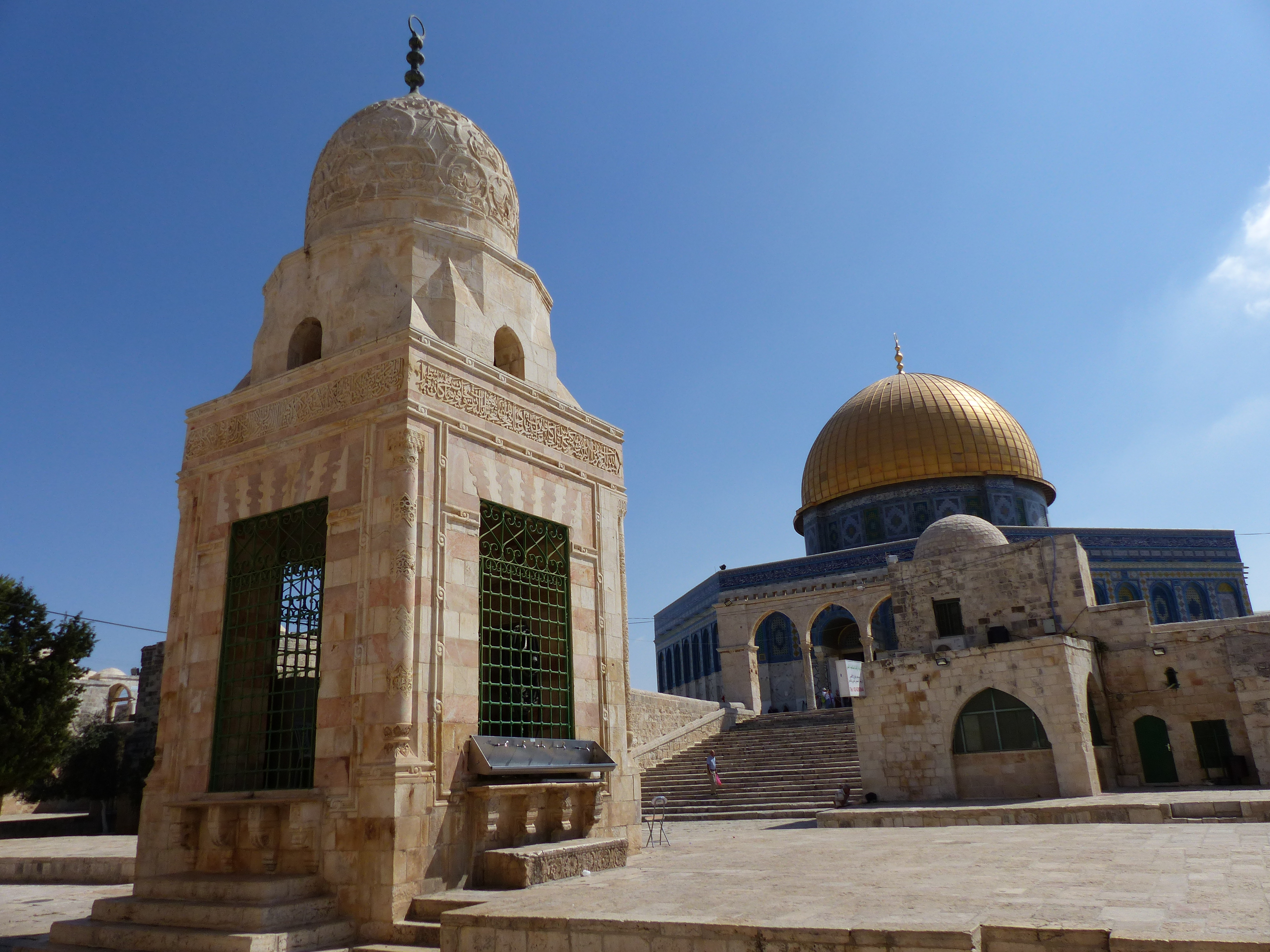 Fuente de Sabil Qaitbay, Jerusalén